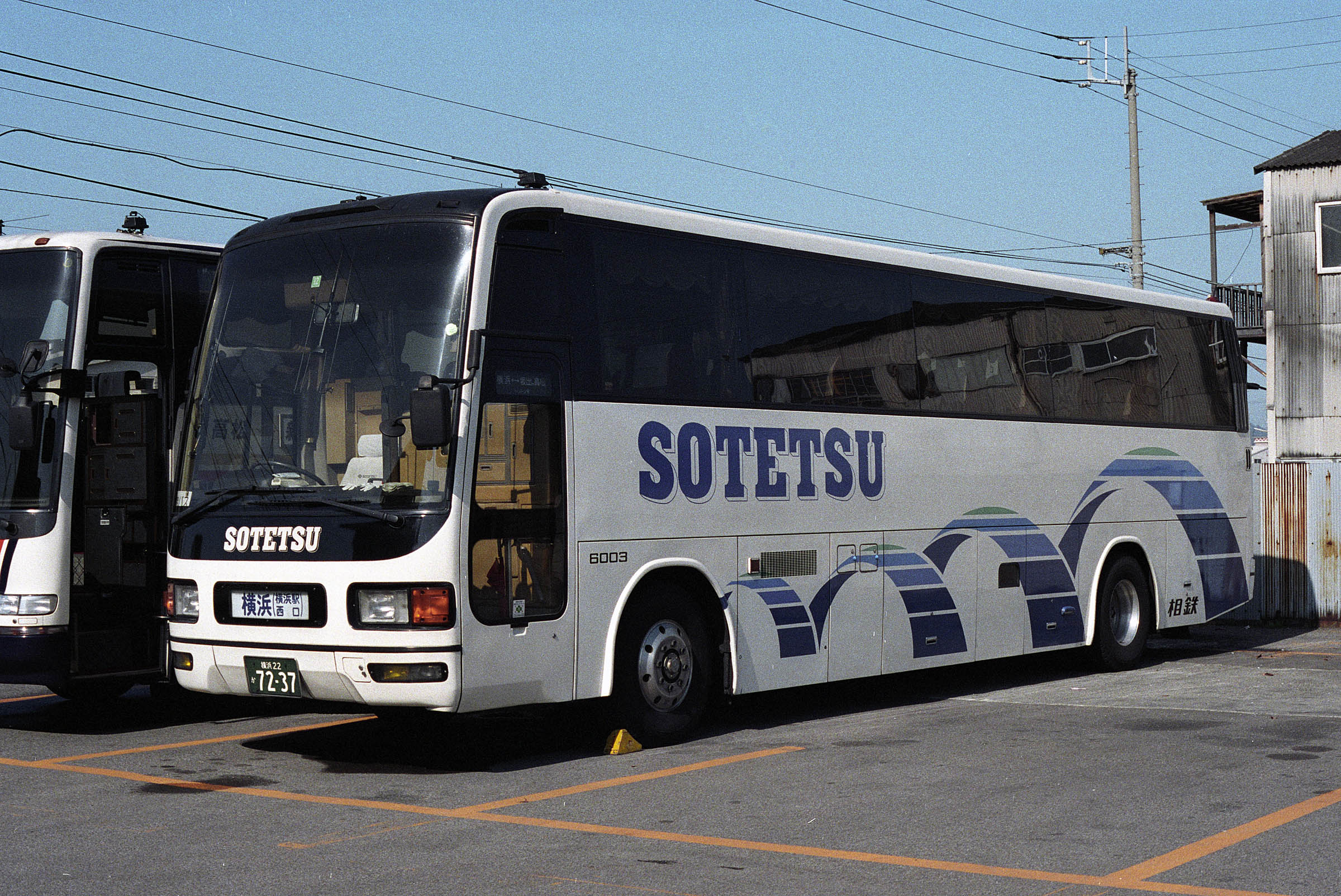 相模鉄道 元ポセイドン専用車 (POSEIDON時代は前面と側面のSOTETSUがPOSEIDONとなり 側面のPOSEIDONのEの下からYOKOHAMA-TOKUYAMA が入っていた）